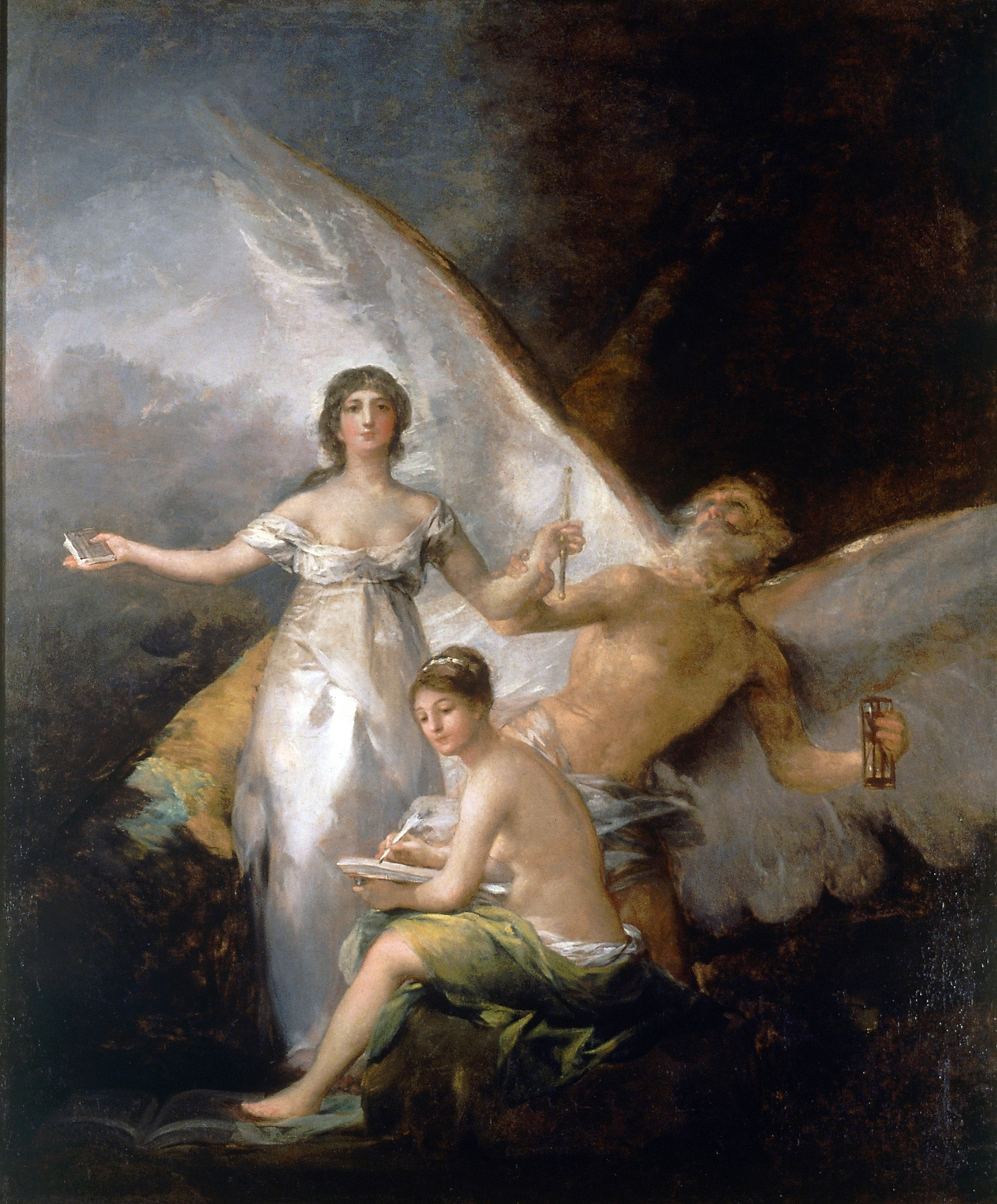 «La Verdad, el Tiempo y la Historia». Óleo sobre lienzo. 294 x 244 cm. Nationalmuseum (Estocolmo, Suecia).